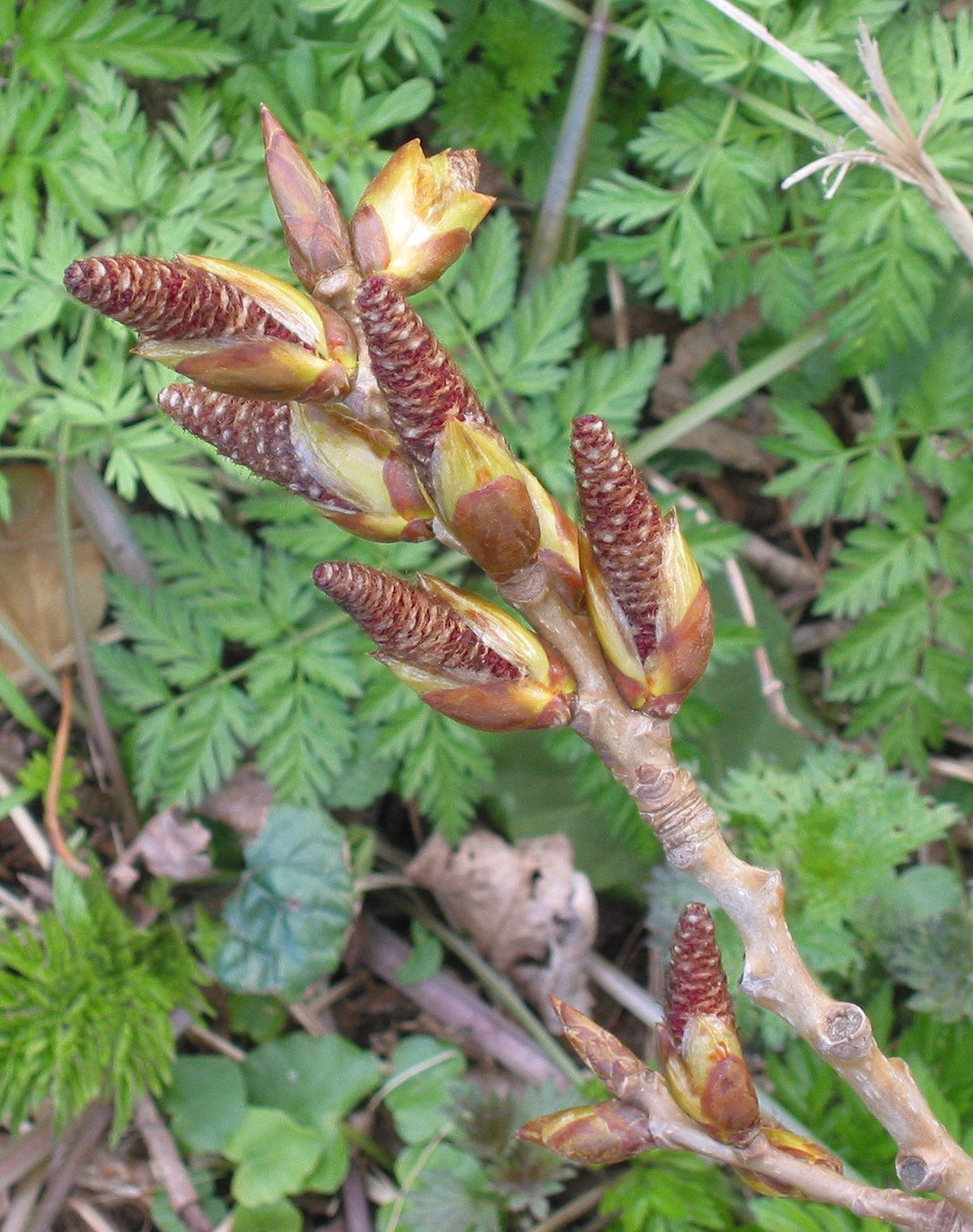 (Euramerikaanse populier bloeiwijze) Populus canadensis inflorescence